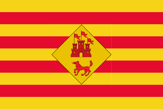 Bandera Oficial del poble de Llubí (Mallorca)